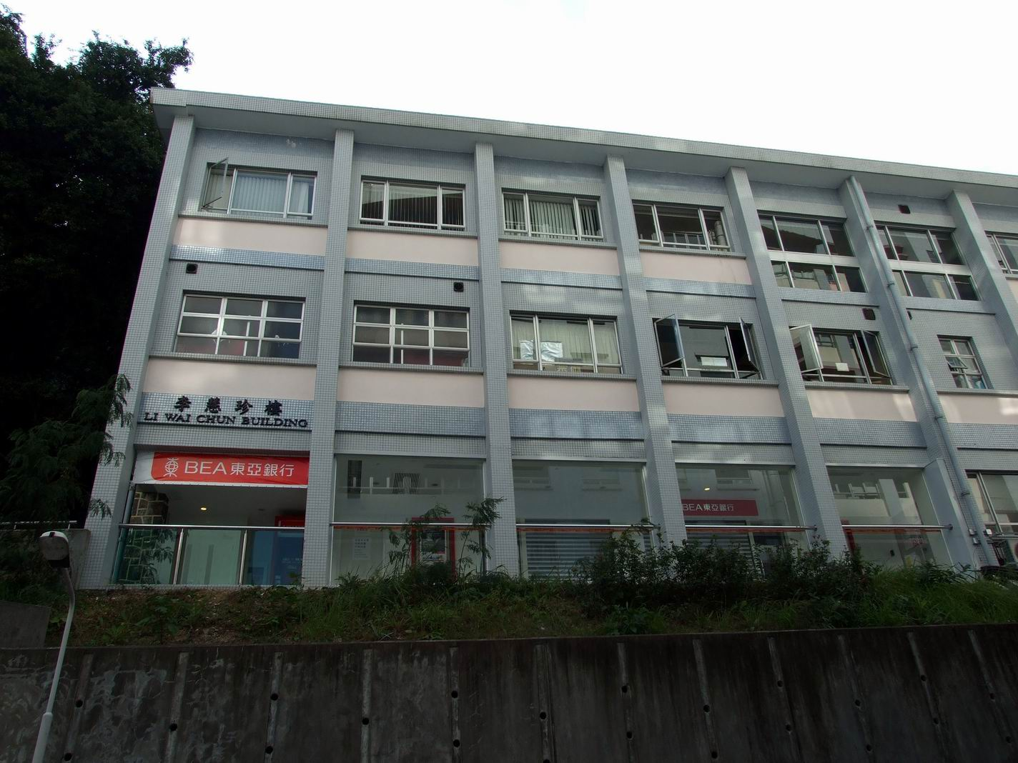 崇基李慧珍樓地庫的東亞銀行分行